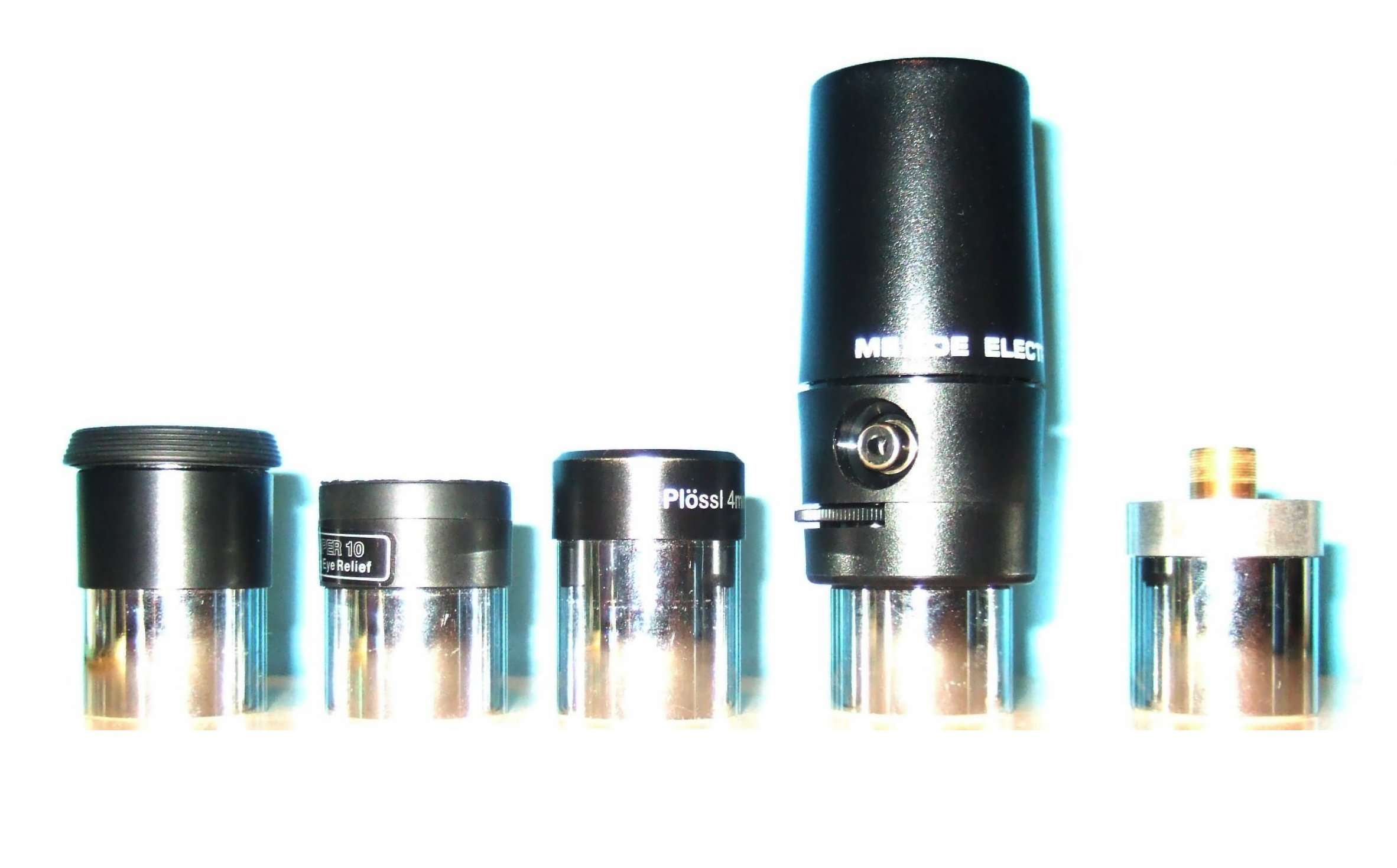 Différents oculaires : De droite à gauche : Oculaire Plössl 20 mm, Oculaire Plössl 10 mm Long Eye Relief, Oculaire Plössl 4 mm AF 50°, Meade Electronic Eyepiece Oculaire photographique, Adaptateur pour webcam.